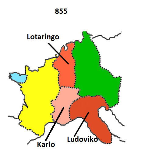 Lotaringo en 855